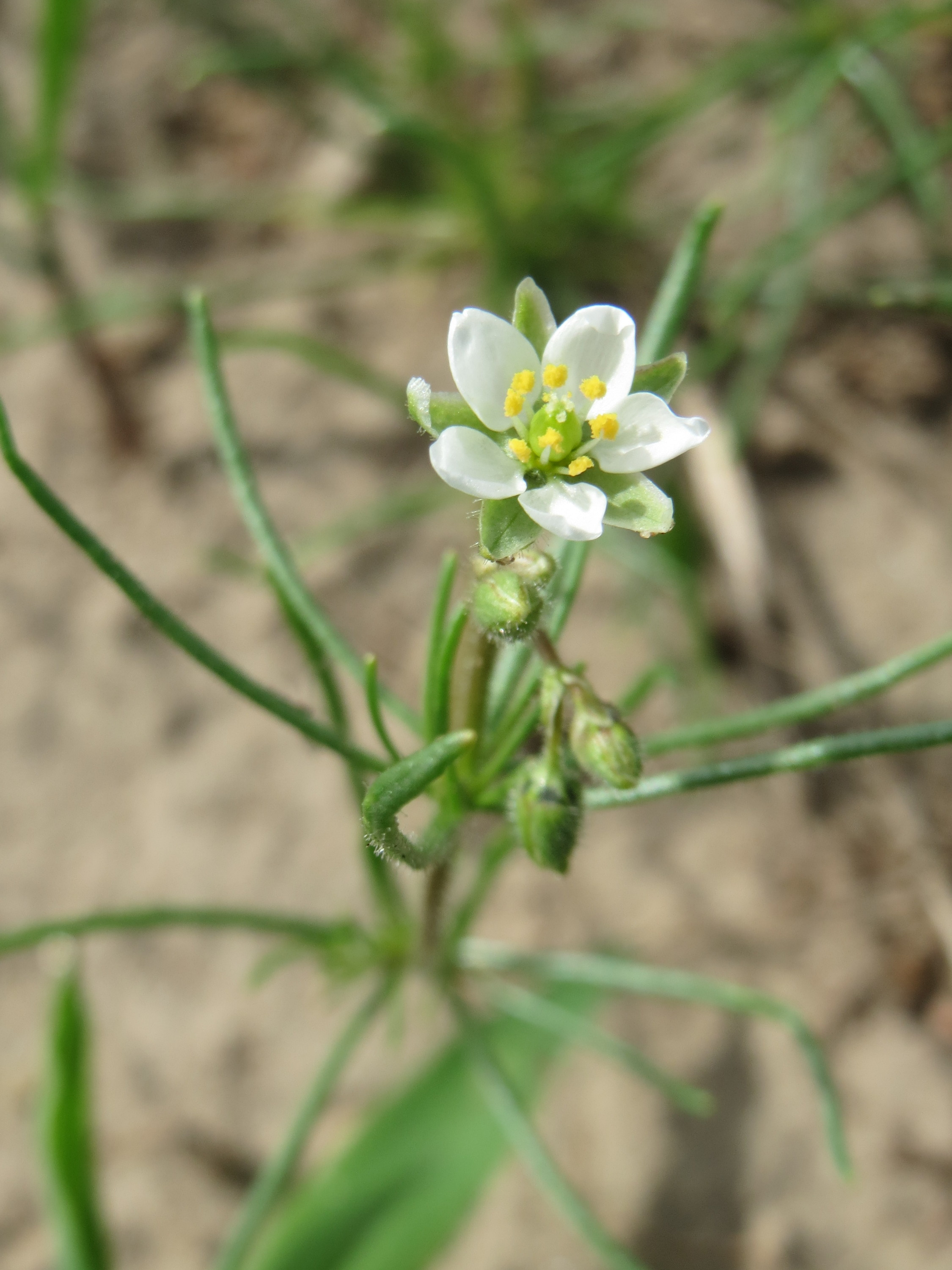 Acker-Spark (Spergula arvensis) auf einer halboffenen Sand-Brachfläche bei Hockenheim